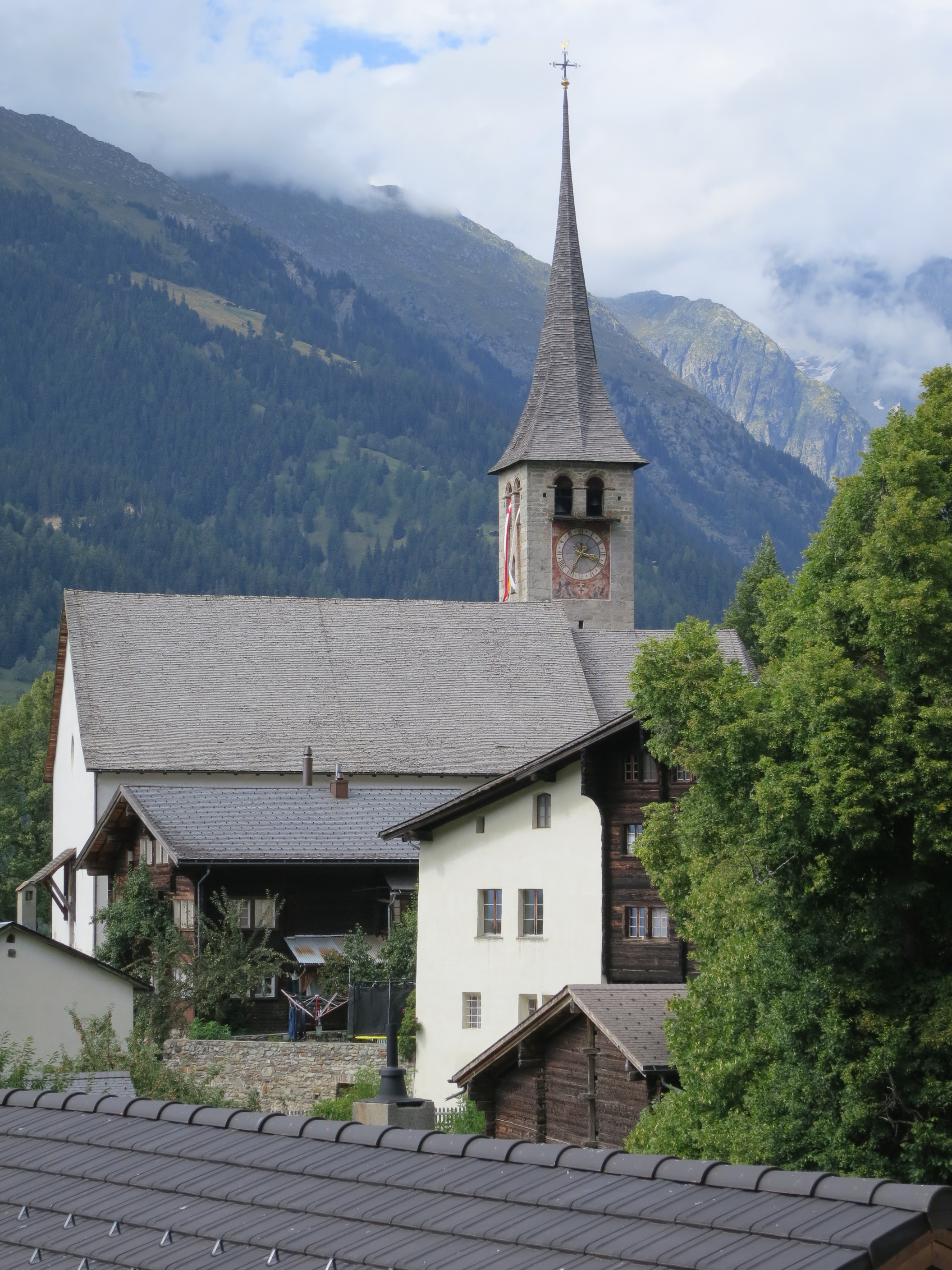 Pfarrkirche Ernen VS, Schweiz